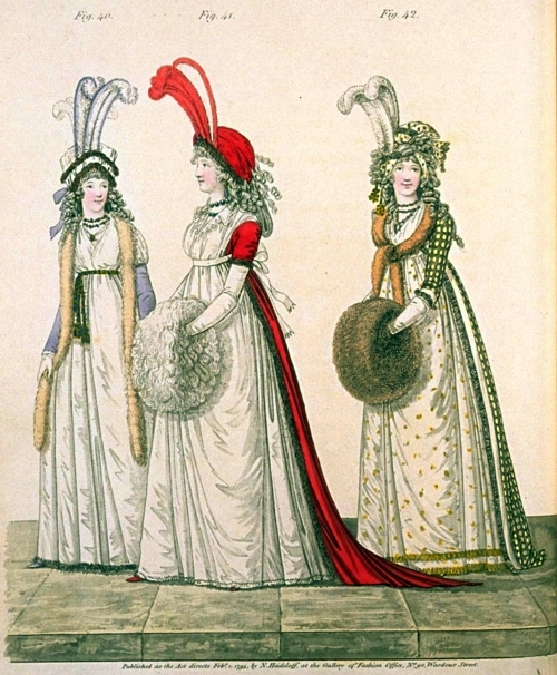 Überdimensionale Muffs unterstreichen die Eleganz der Empiremode. Kupferstich